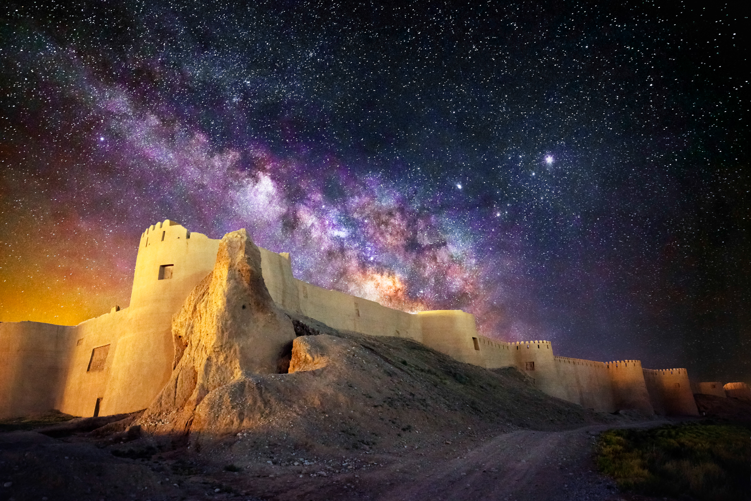 شهر بلقیس در شهرستان اسفراین خراسان شمالی. شهر بلقیس در واقع بقایای شهر تاریخی اسفراین است که از دوران پیش از ورود اسلام تا صفویان زندگی در آن جریان داشته و نهایتاً در حمله افغان‌ها به ایران ویران شد و تدریجاً نام افسانه‌ای بلقیس بر آن گذاشتند. شهر اسفراین کنونی بعدها با پیوستن چند روستا به یکدیگر در ۳ کیلومتری آن تأسیس شد.